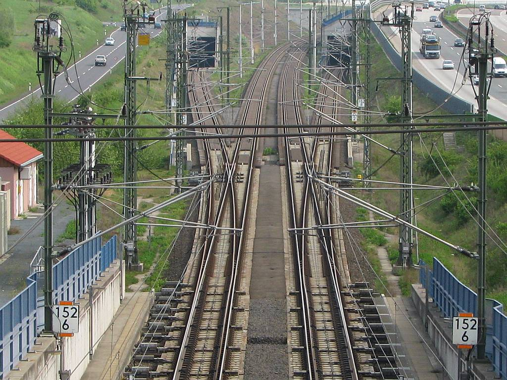 Die Ostportale des Wandersmann-Nord-Tunnels der Schnellfahrstrecke Köln - Rhein-Main an der Abzweigstelle Breckenheim (bei km 152,6) - Foto 2009 Wolfgang Pehlemann IMG_5152